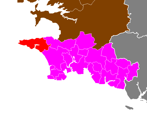 Maps of arrondissements and cantons of France: Arrondissement de Quimper - Canton de Pont-Croix.PNG (Département du Finistère , Arrondissement de Quimper)